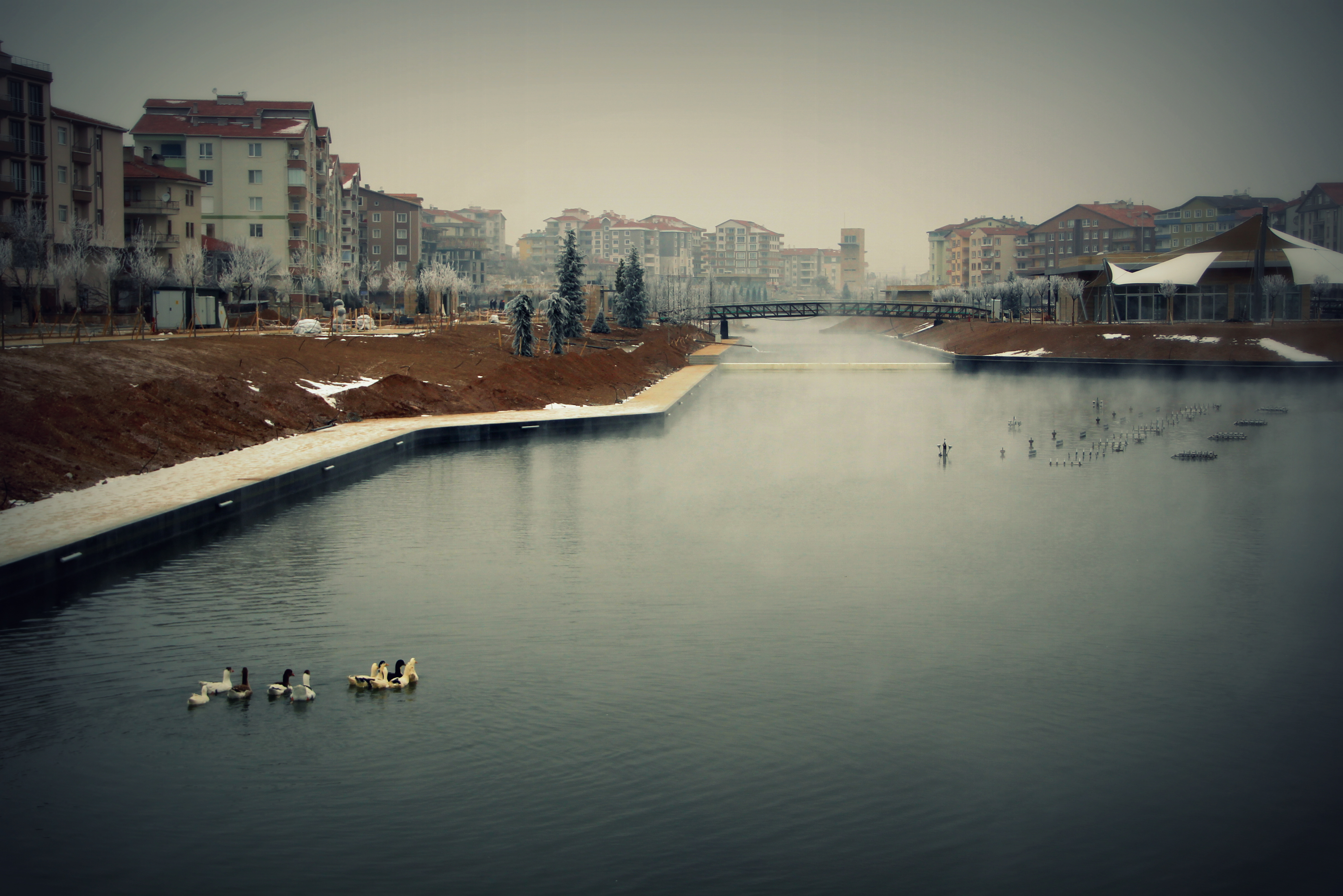 Kent Park